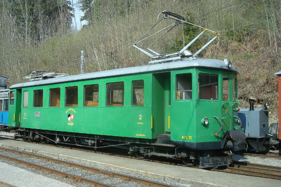 Motorwagen Be 4/4 111 (1903) der ehemaligen Chemins de fer électriques de la Gruyère (CEG), heute Freiburgische Verkehrsbetriebe (TPF), bei der Museumsbahn Blonay-Chamby in Chamby-Musée (Chaulin), im Frühling 2010.